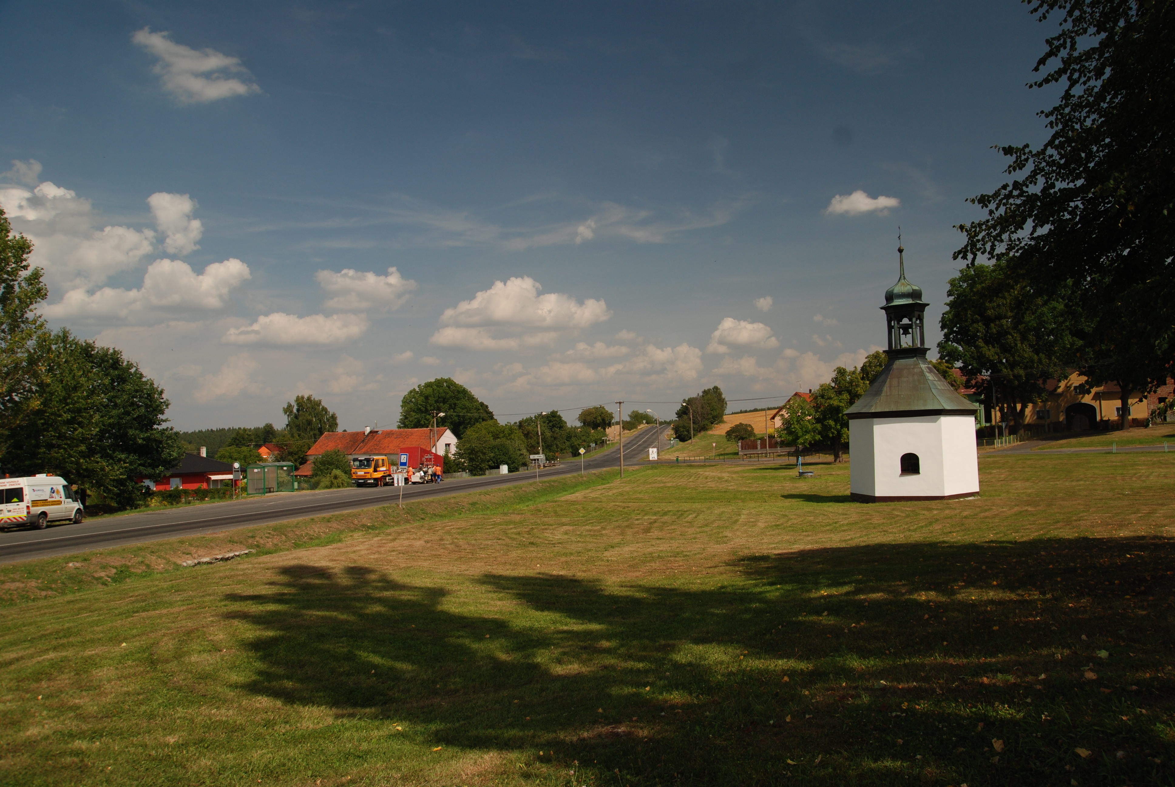 Kaple u hlavní silnice a pohled na ves